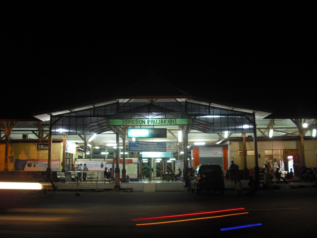 Stasiun Prujakan